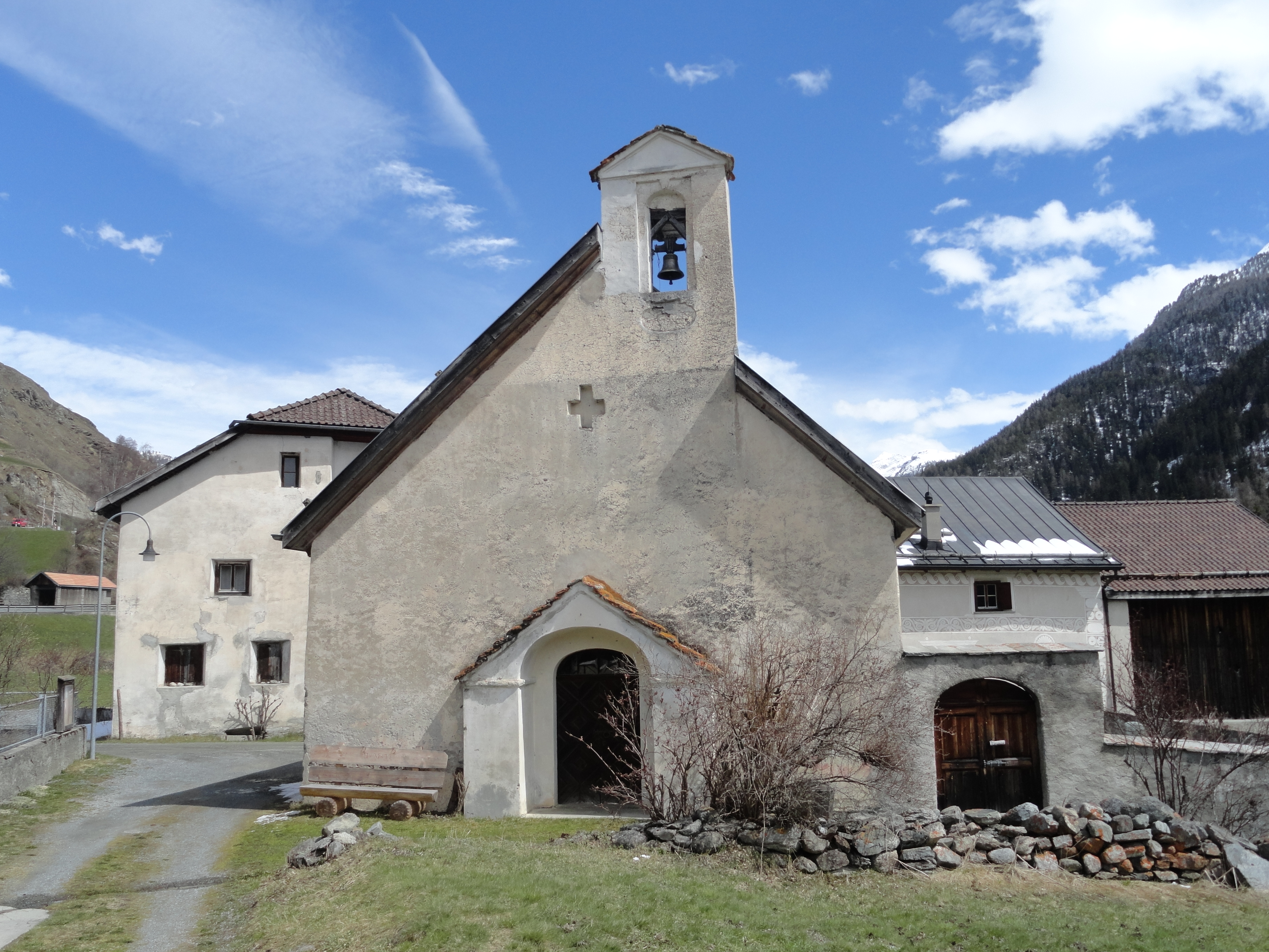 Reformierte Kirche Giarsun] Ansicht von Westen